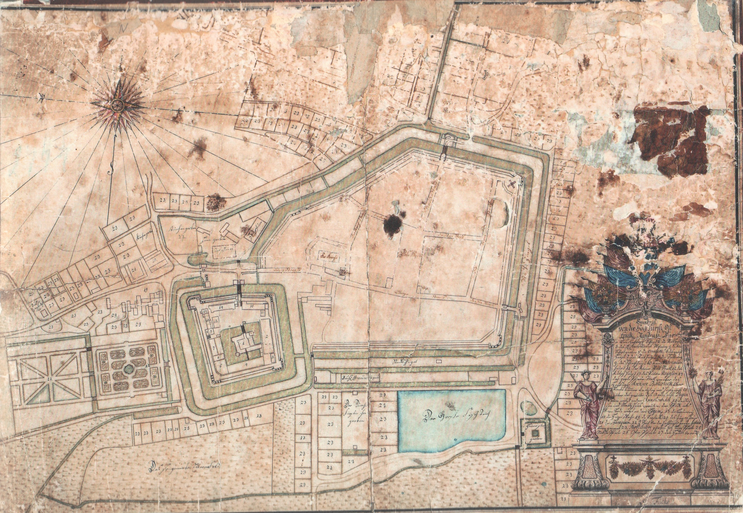 A. Fuchs: Grundriss von der Hochfürstlichen Residentz Aurich (Staatsarchiv Aurich, Rep 244. B 2774